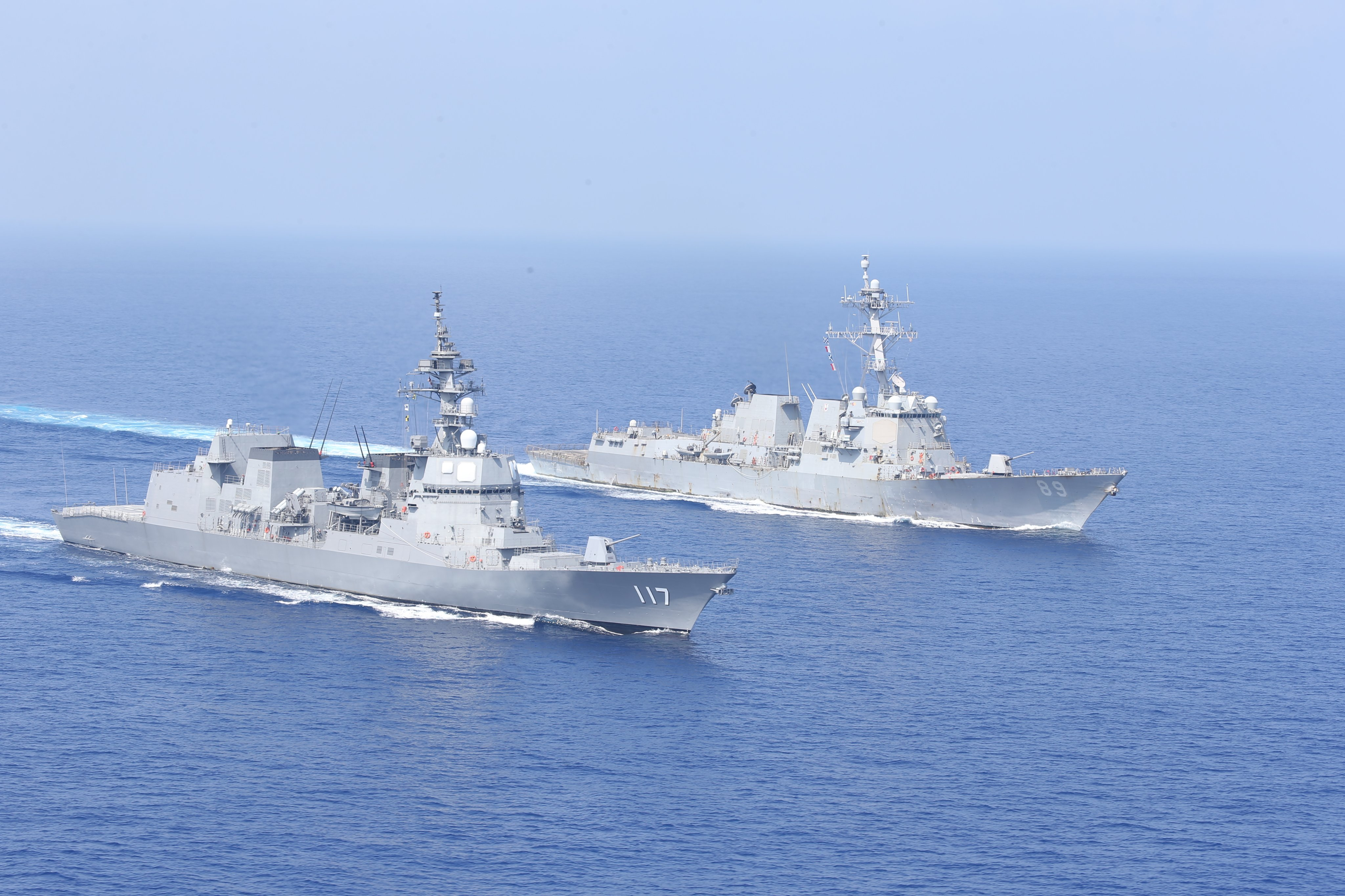 護衛艦「すずつき」と米海軍駆逐艦「マスティン」